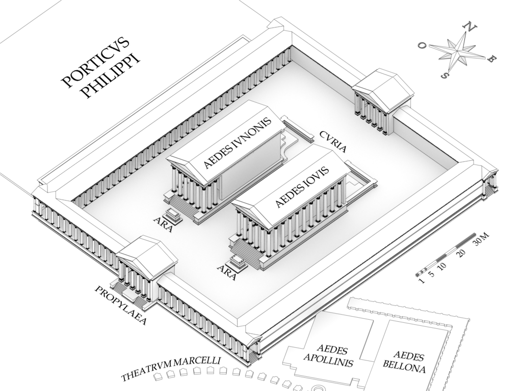 Restitution du portique d'Octavie D'après : - Gismondi, Plastico di Roma Imperiale, 1933-1937 - Filippo Coarelli, Rome and environs : an archaeological guide, 2007 - Gorrie, The restoration of the Porticus Octaviae and severan imperial policy, 2007 Perspective isométrique Voir aussi